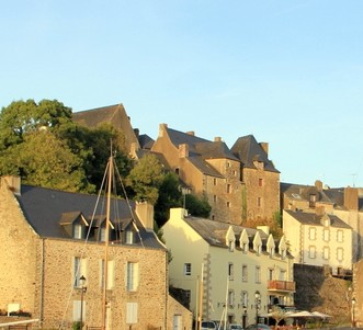 Vue du Musée de La Vilaine maritime depuis le port